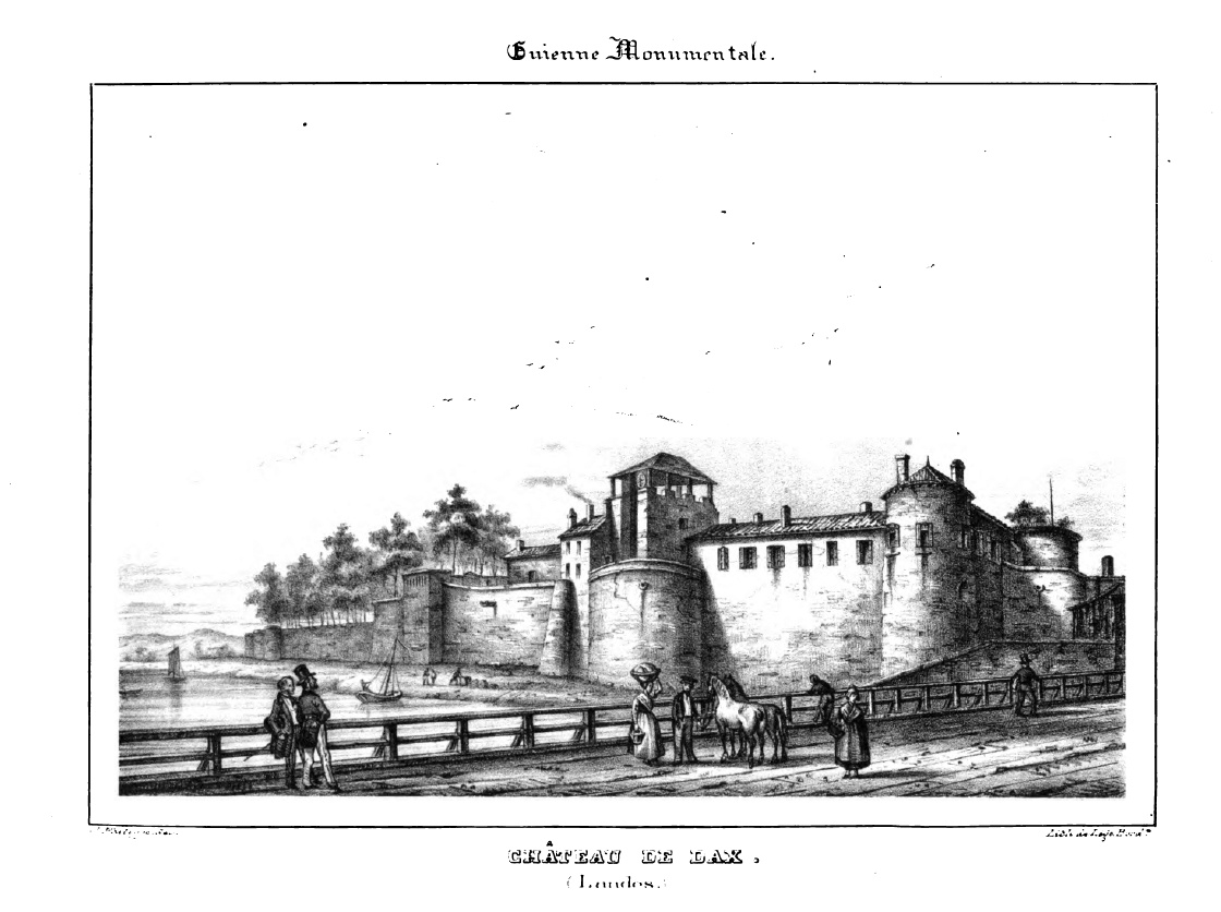 Château de Dax